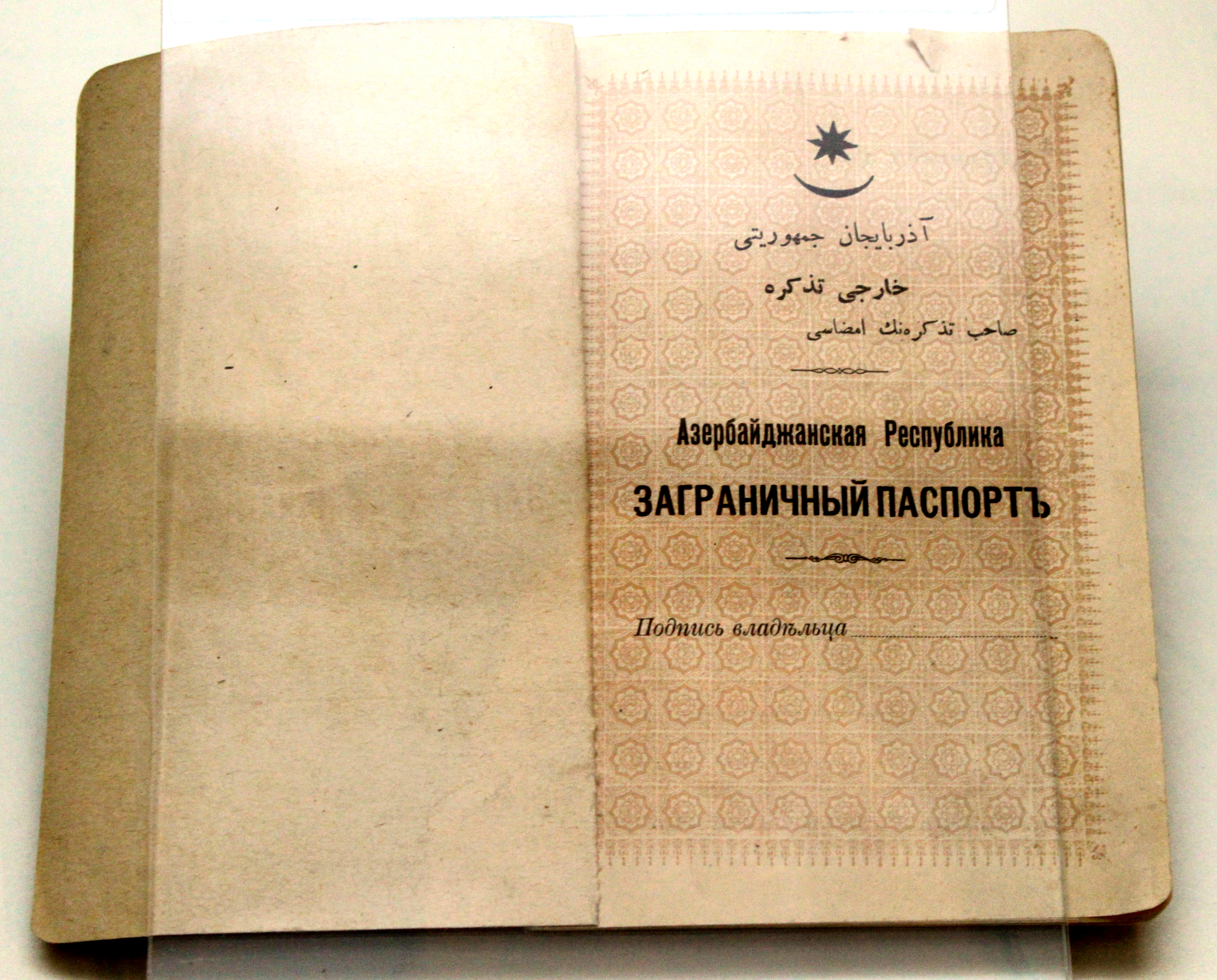 AXC-nin Beynəlxalq Passportu